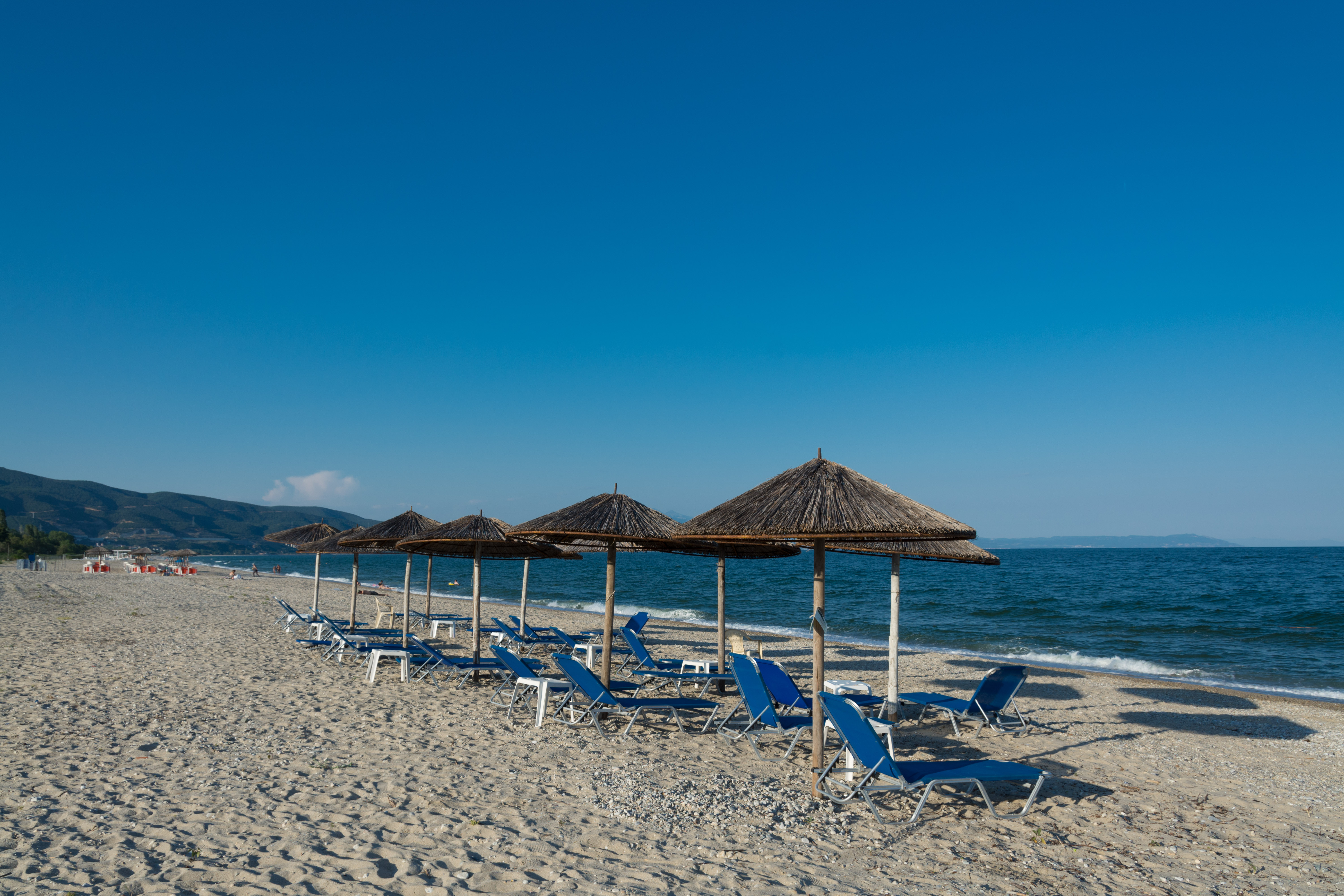 Ασπροβάλτα